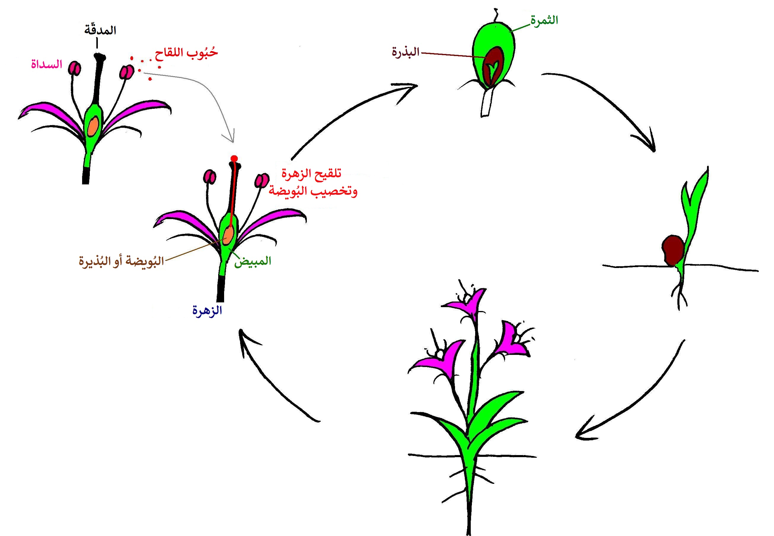 مُخطط لدورة حياة كاسيات البُذُور.